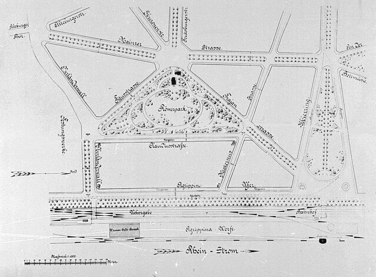 Zeichnung: Römerpark (Entwurf 1895)